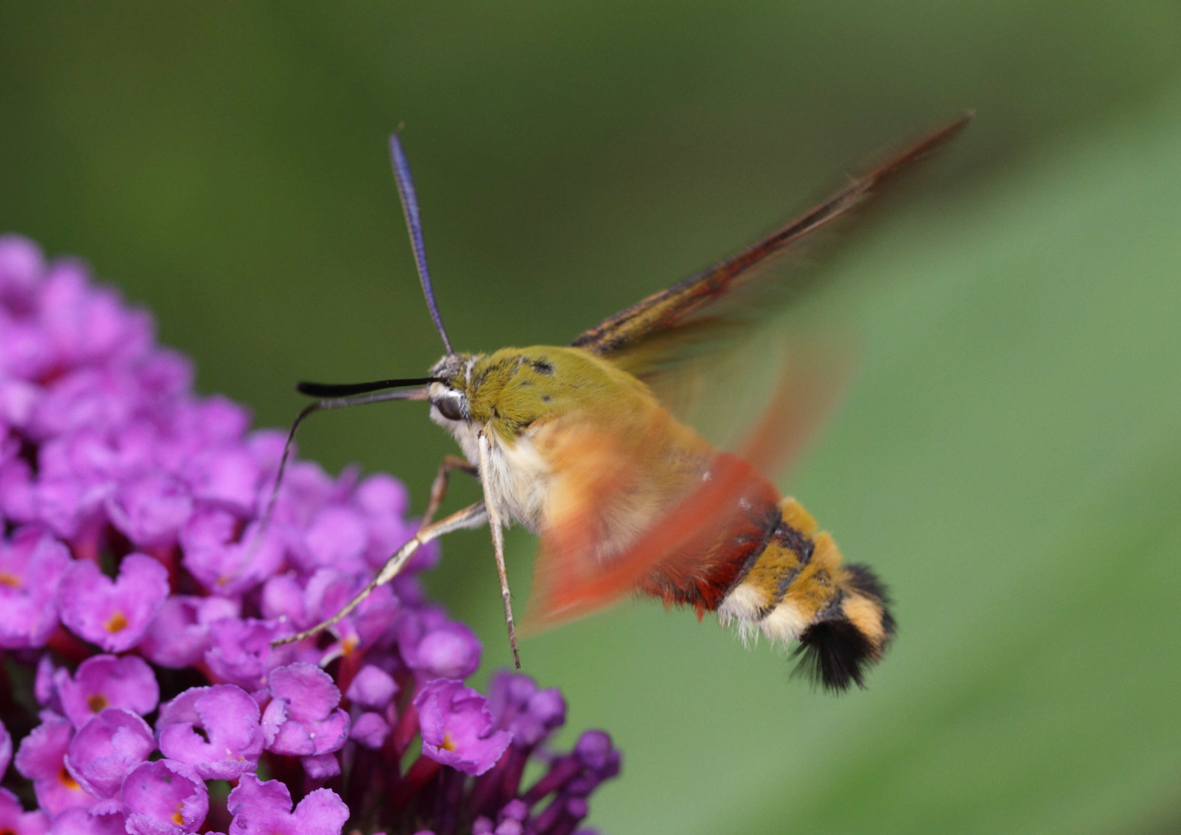 Ein Hummelschwärmer im Schlosspark Schönbrunn.